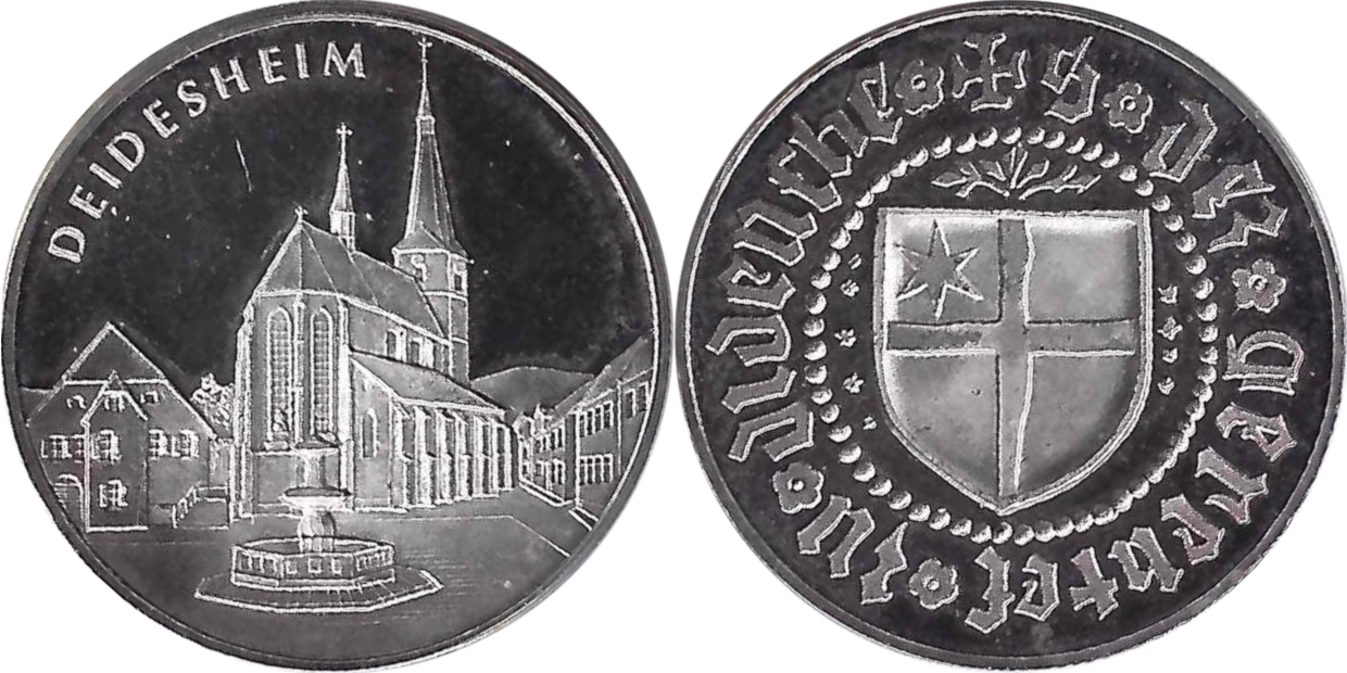 Die Gedenkmünzer erinnert an das Siegel des Gerichts zu Deidesheim aus dem Jahr 1410. Dieses zeigte ein durchgehendes Kreuz, das mit einem sechsstrahligen Stern bewinkelt war.